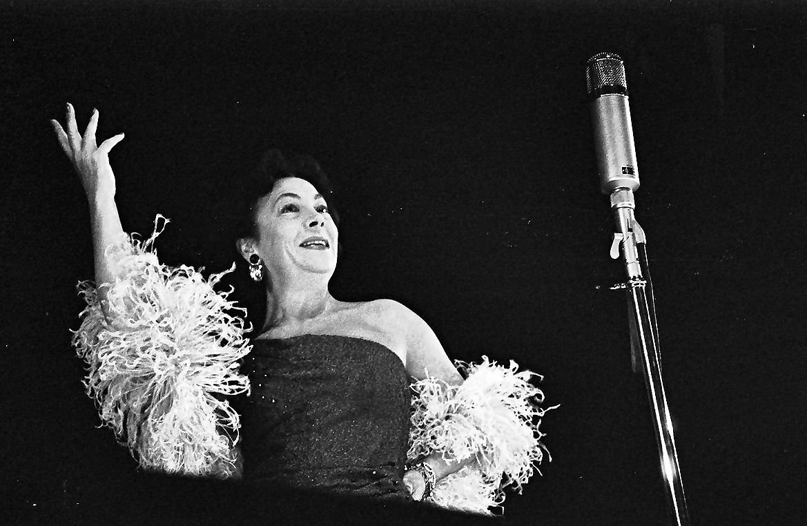 Freiburg: Stadthalle; Die Insulaner; Tatjana Sais „Wie werde ich Star“